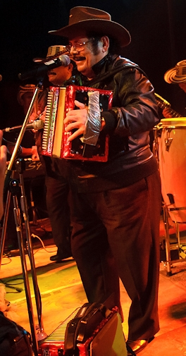 Aníbal Velásquez en el Salón de Baile. Fusion Festival 2011, Alemania.